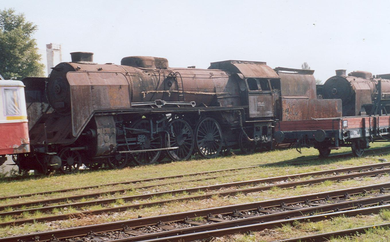 387.019 im Lokomotivdepot Bratislava Vychod